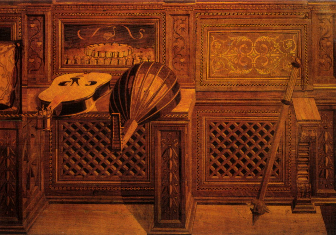 Studiolo Attributed to Giuliano and Benedetto da Maiano Mosaic woodwork Urbino, Palazzo Ducale